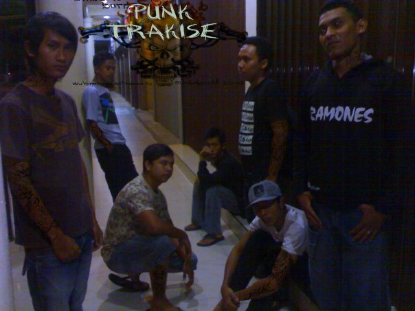 punk